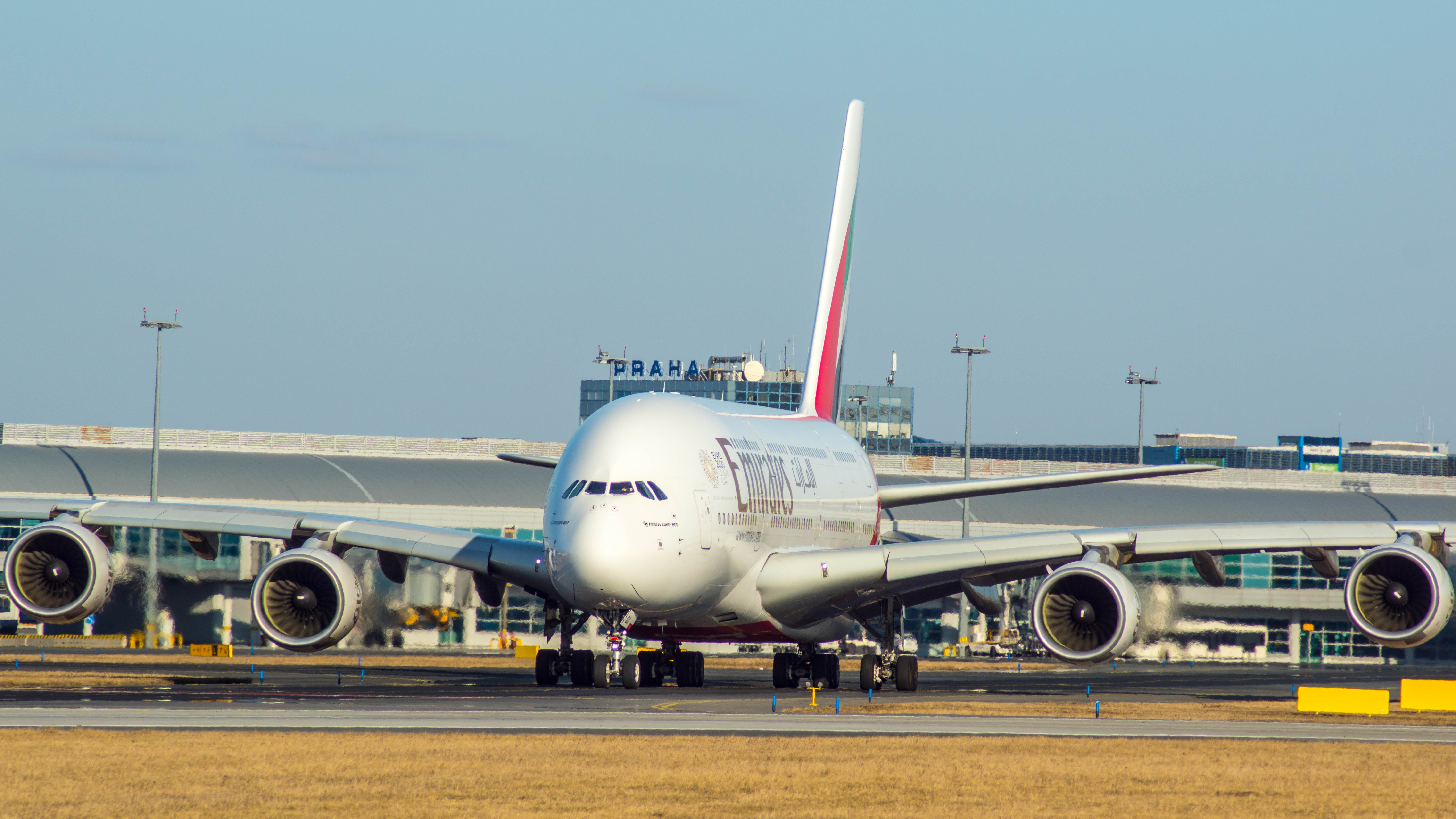 Prague Airport